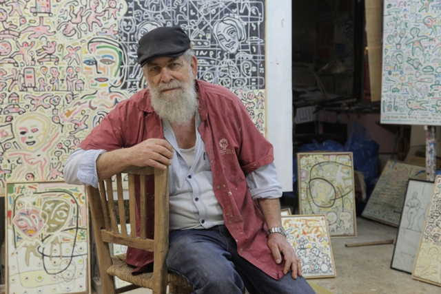 שאול קנז בתצלום מאת רן ארדה